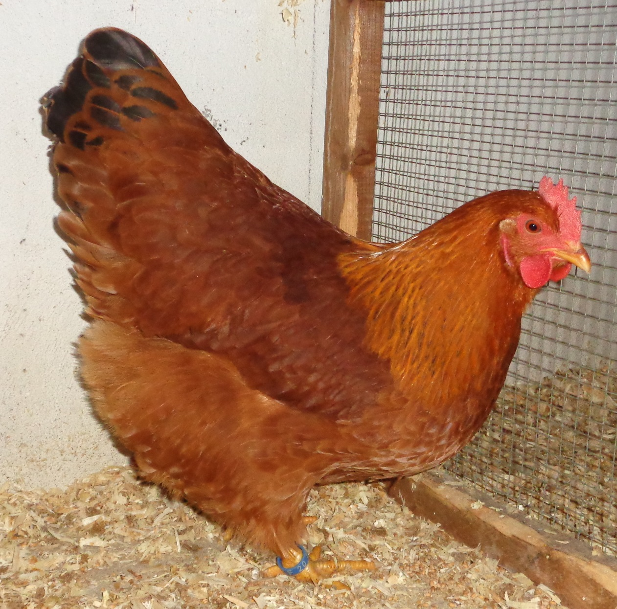 Poule